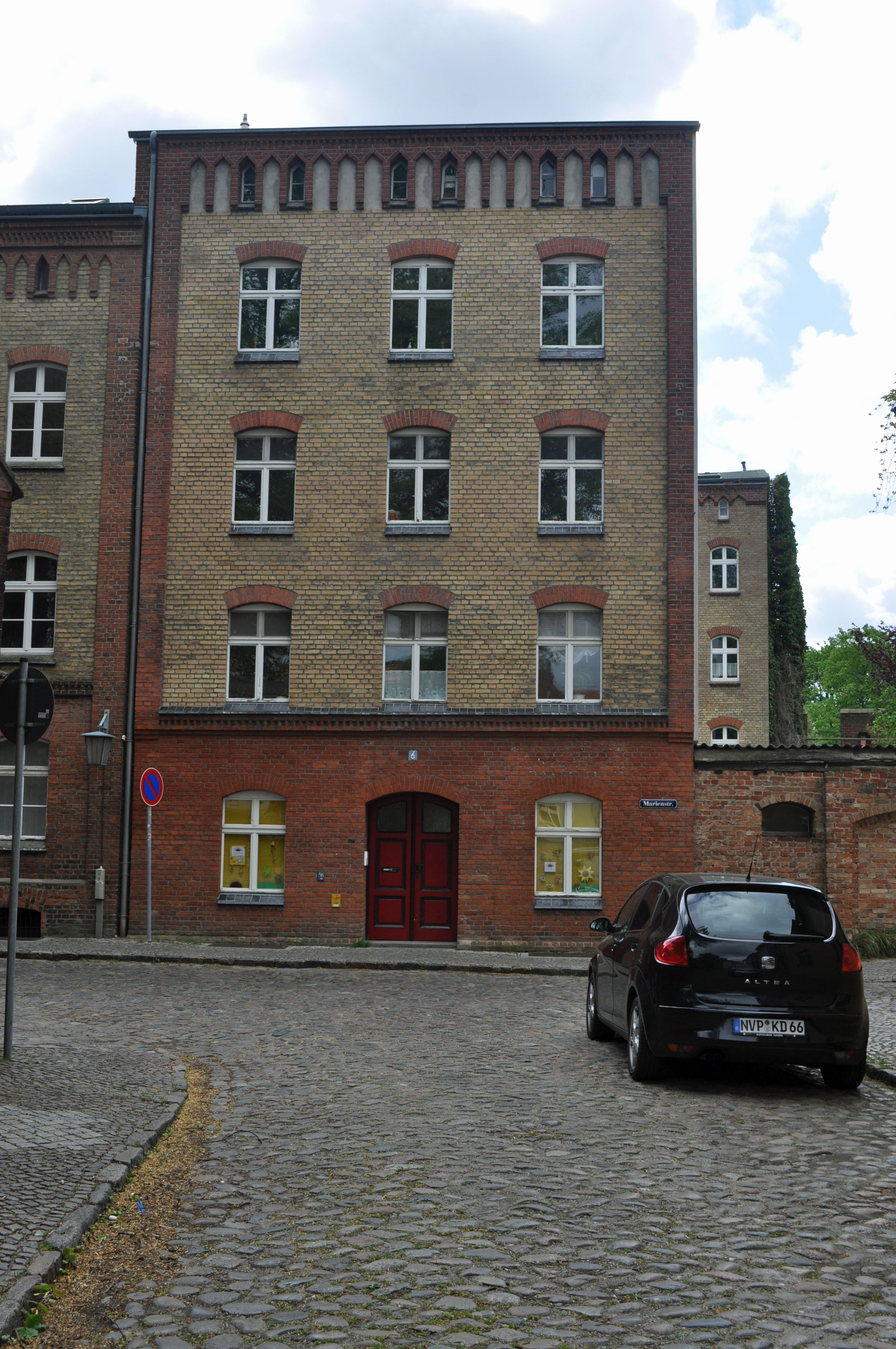 Gebäude in Stralsund, siehe Dateiname